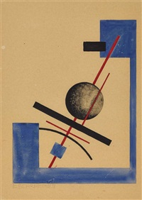 Eberhard Schrammen Konstruktivistische Komposition 1920